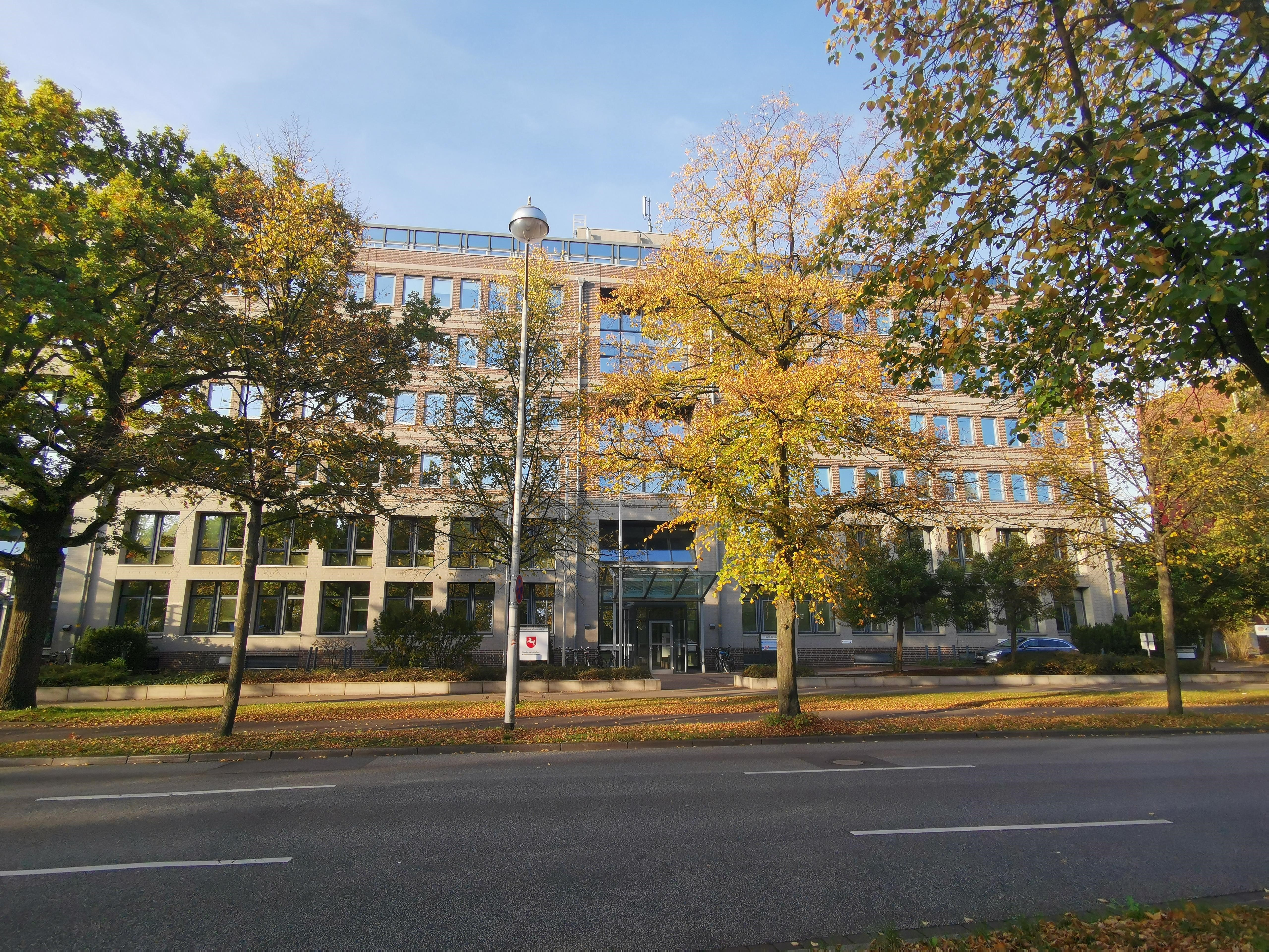 Sitz des Niedersächsischen Kultusministeriums an der Hans-Böckler-Allee 5 in Hannover